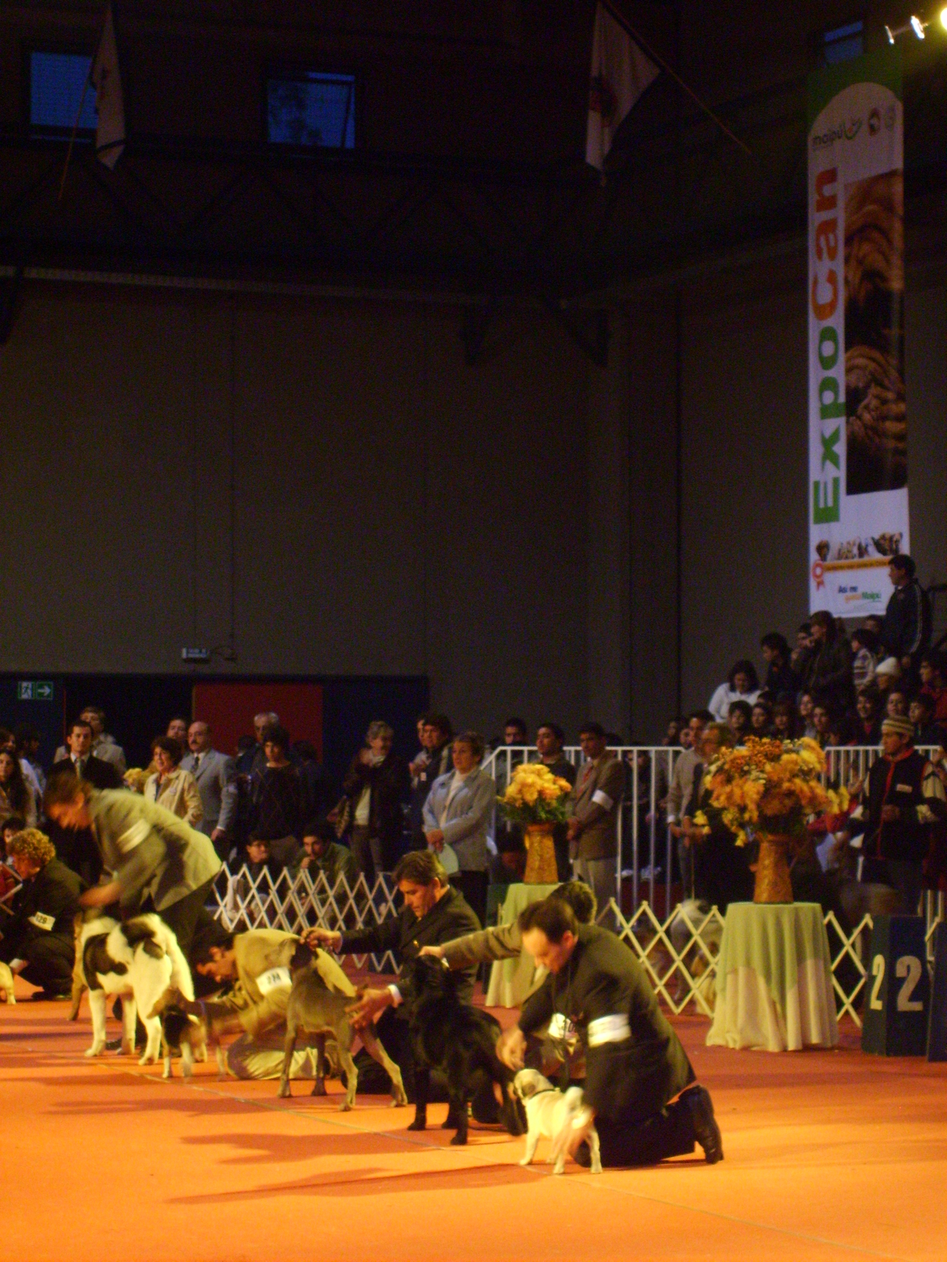 La exposición canina ExpoCan 2008, llevada a cabo en el Gimnasio Olímpico Fernando González. Maipú, Santiago de Chile.